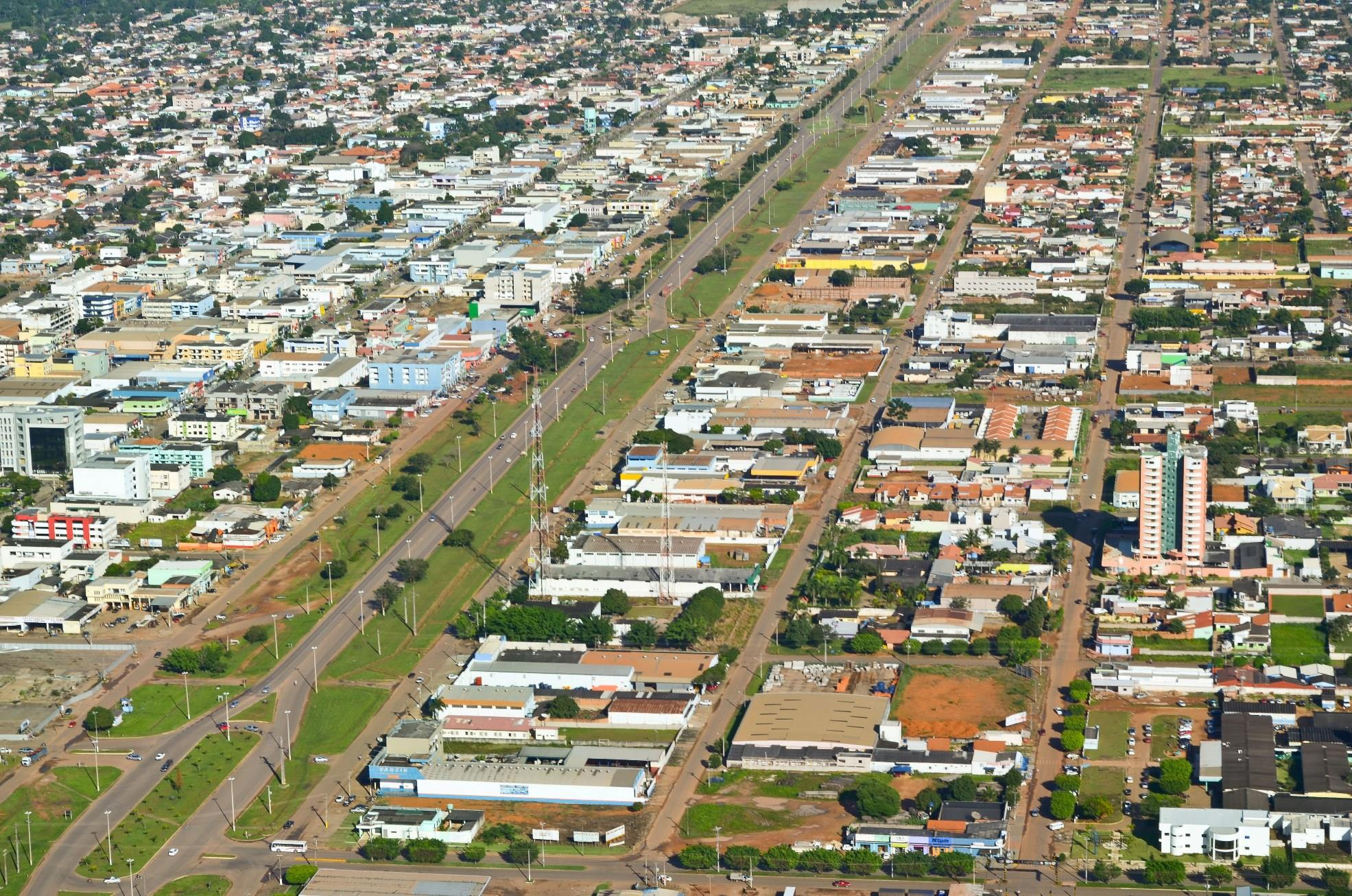 Vilhena RO